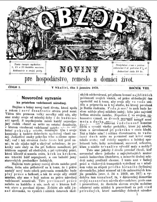 Obzor : : Noviny pre hospodárstvo, remeslo a domáci život - vychádzal na Slovensku v 19. storoči